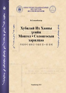 Монгол: Б. Сумъяабаатар, "Хубилай Их Хааны үеийн Монгол Солонгосын харилцаа", 439, ISBN 978-99973-3-025-3